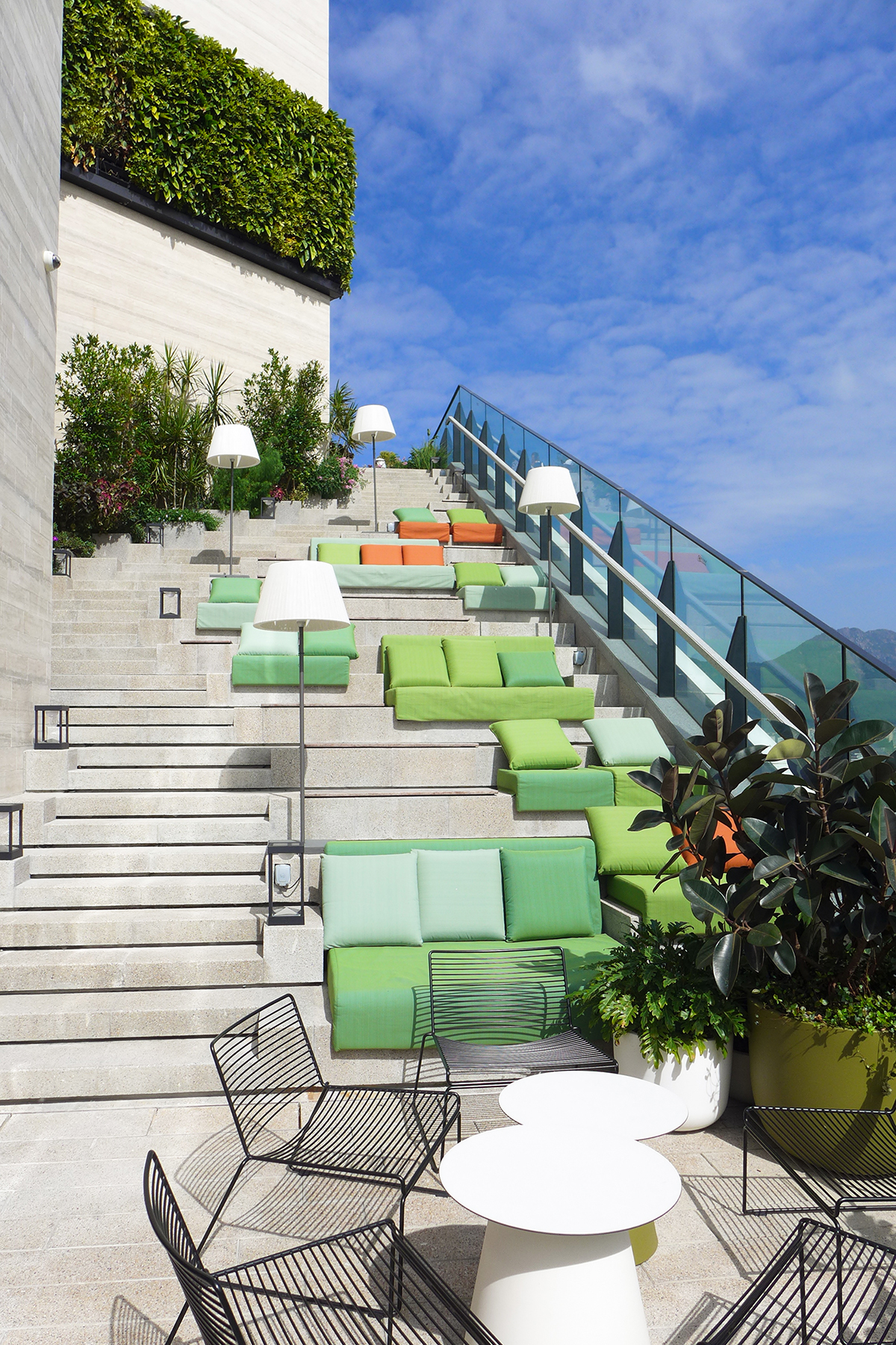 SKYPARK Rooftop garden